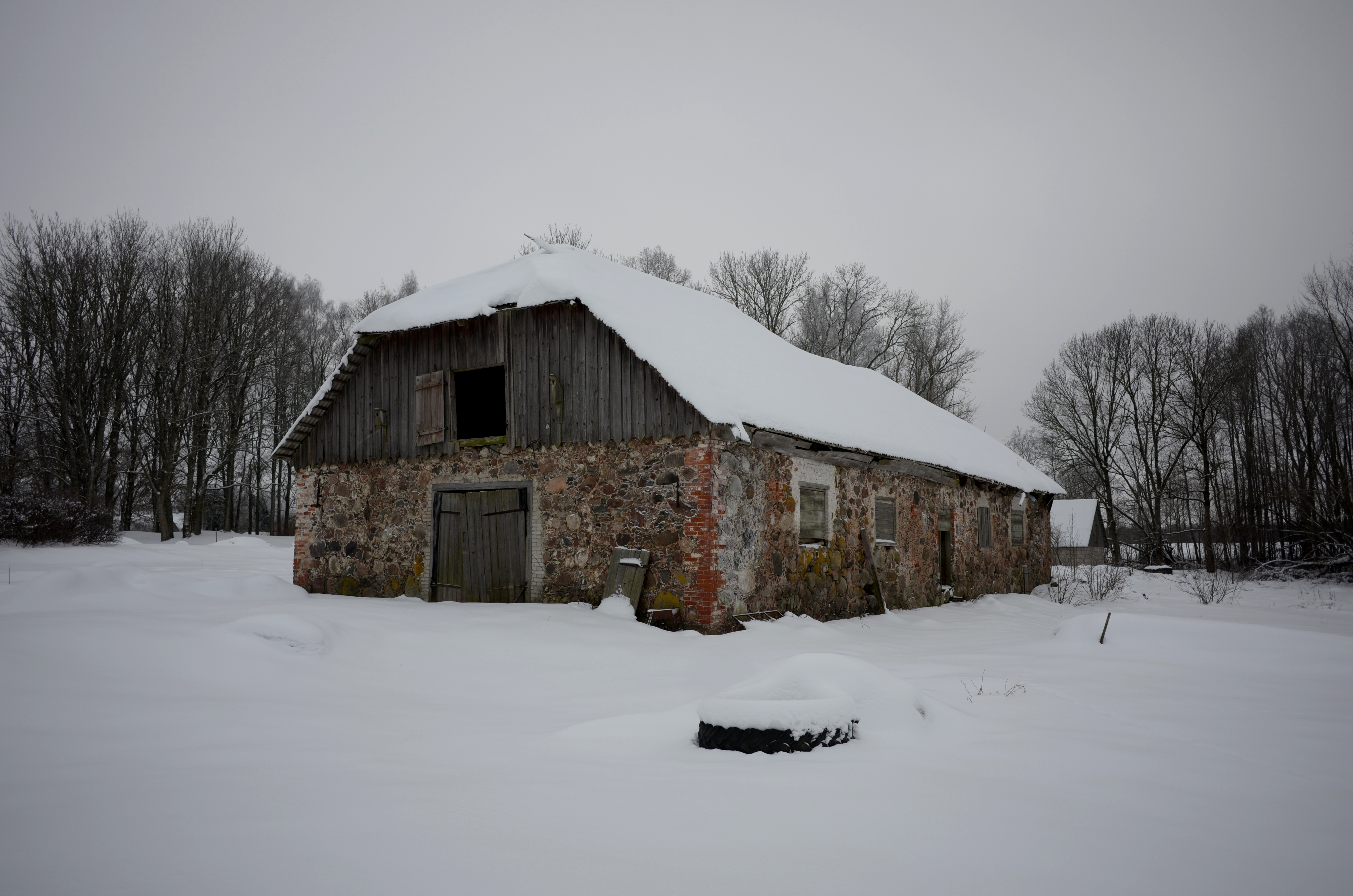 Pilka mõisa kõrvalhoone (2019)